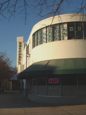 Roosevelt Center, Greenbelt, Maryland